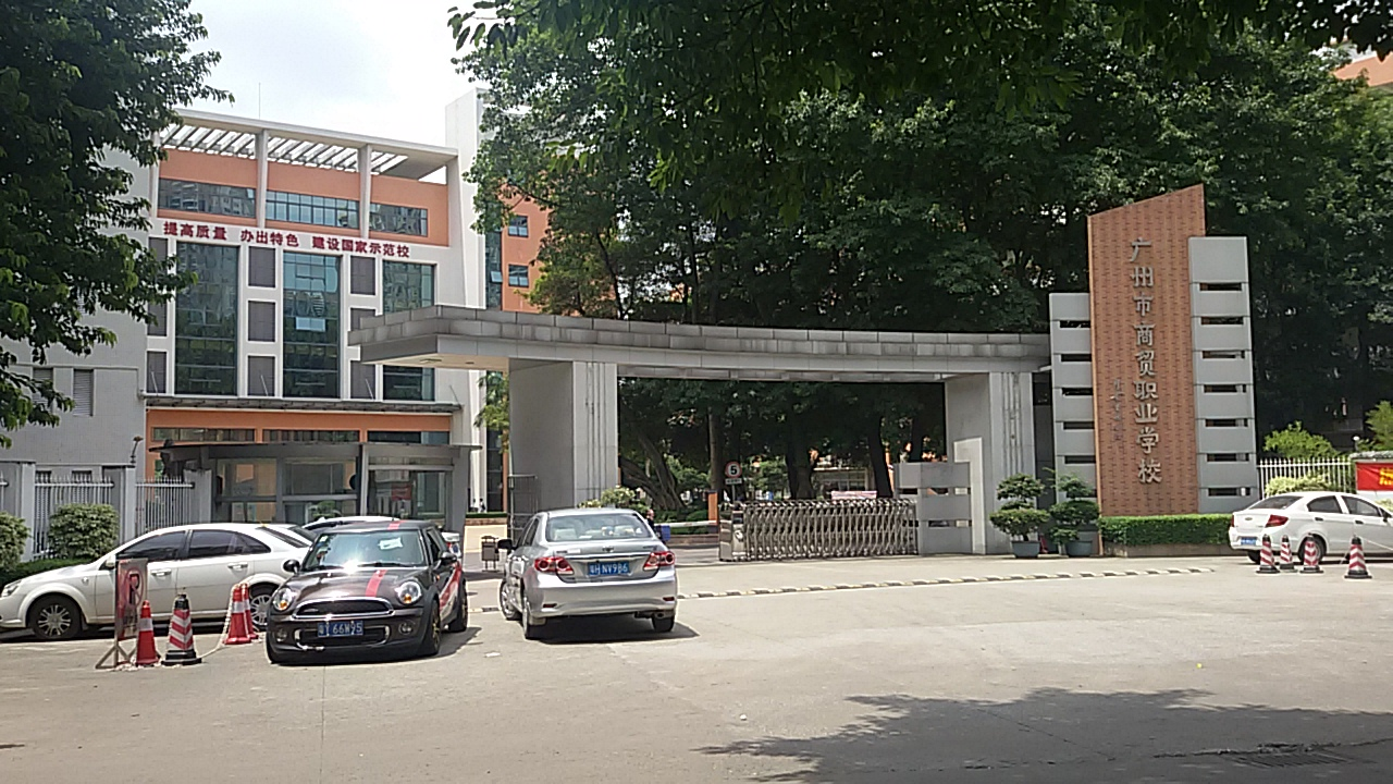 粵語: 广州市商贸职业学校（南校区）